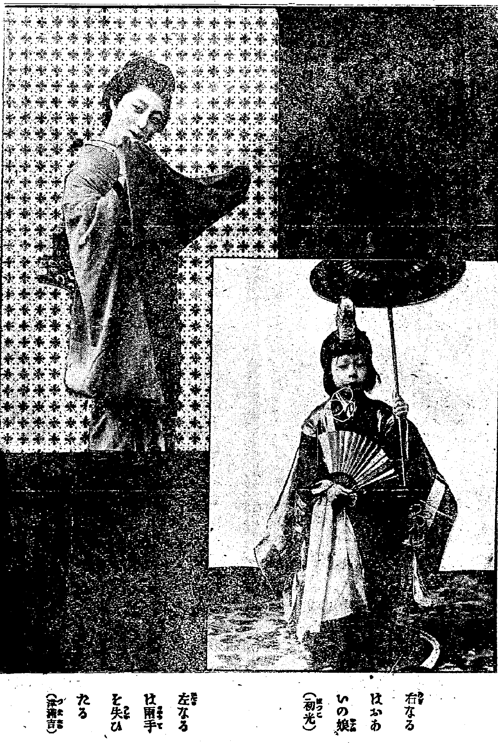 妻吉（左）と初光